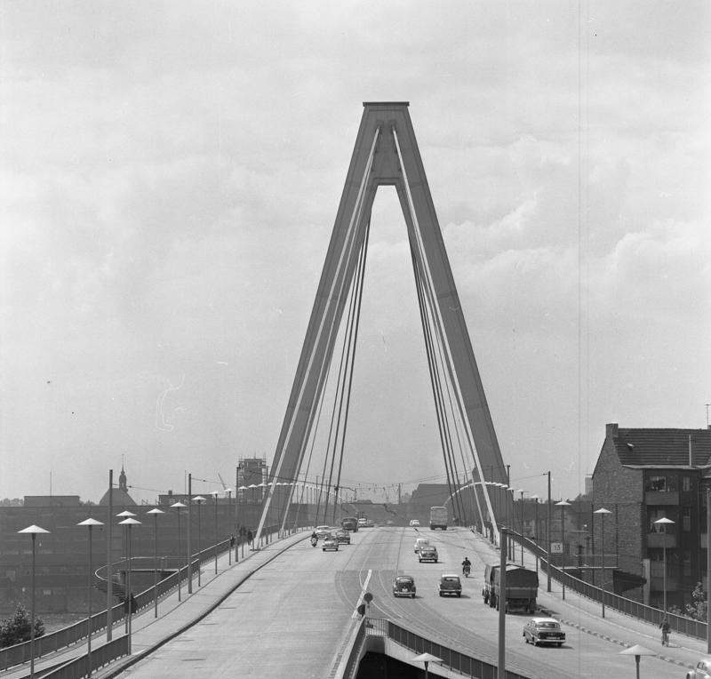 Rheinbrücke St. Severin in Köln